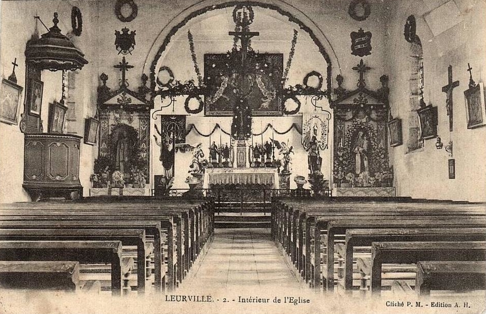 Carte postale de l'église vers 1910